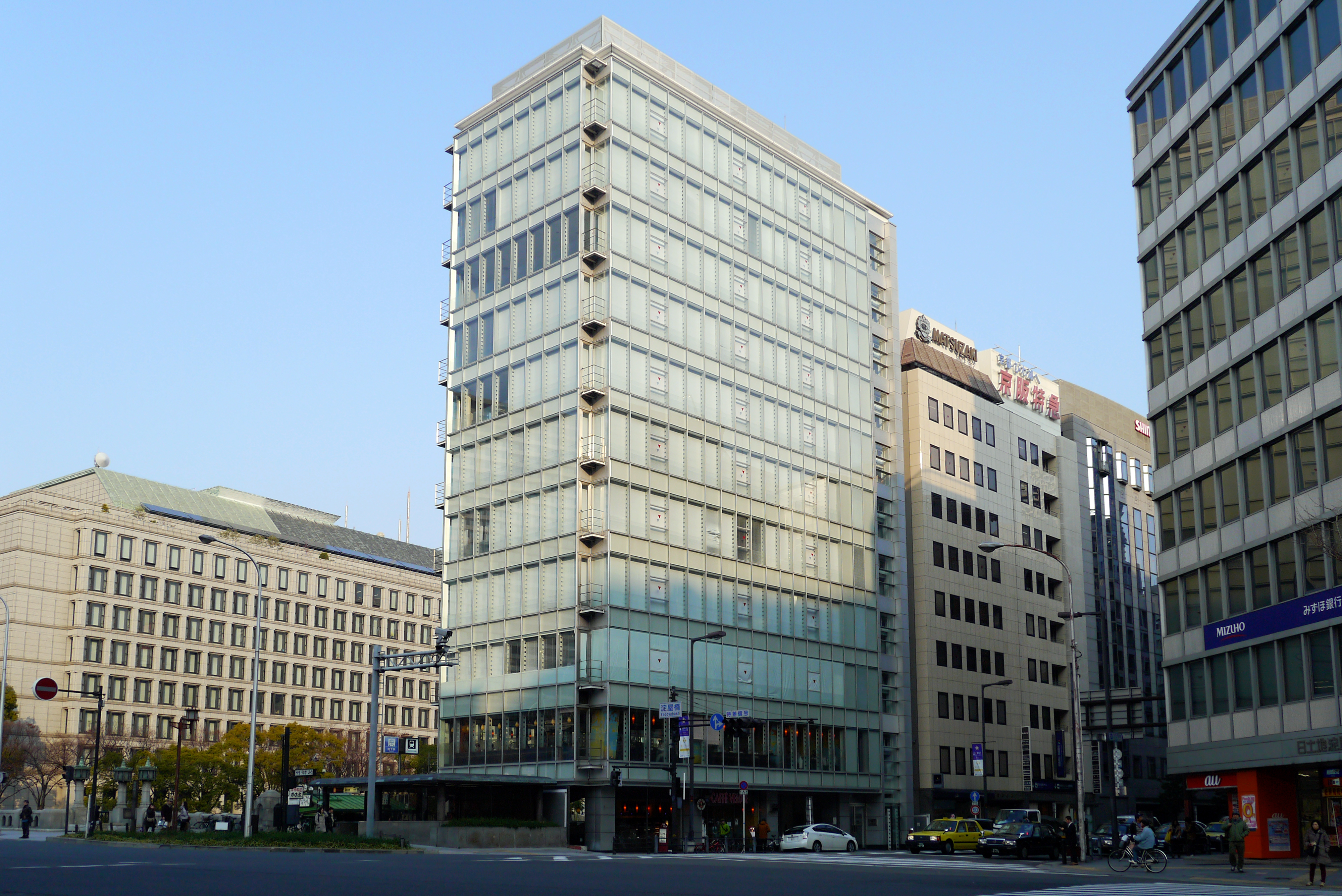 Yodoyabashi Station (淀屋橋駅), Osaka, Osaka prefecture, Japan